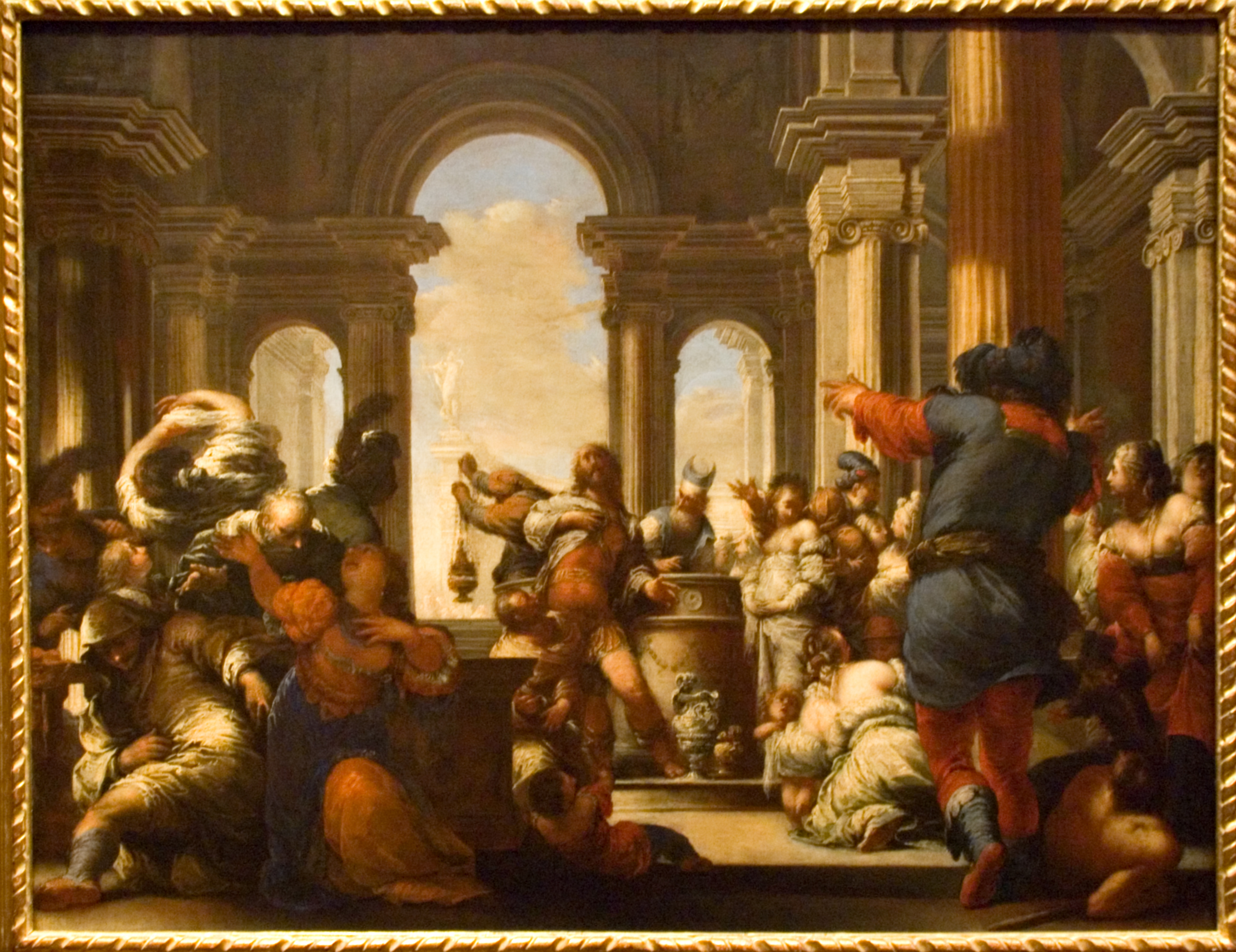 Baroque Sacrifice of Jephthahs Daughterlabel QS:Len,"Baroque Sacrifice of Jephthahs Daughter" label QS:Lfr,"Sacrifice baroque de la fille de Jephté"